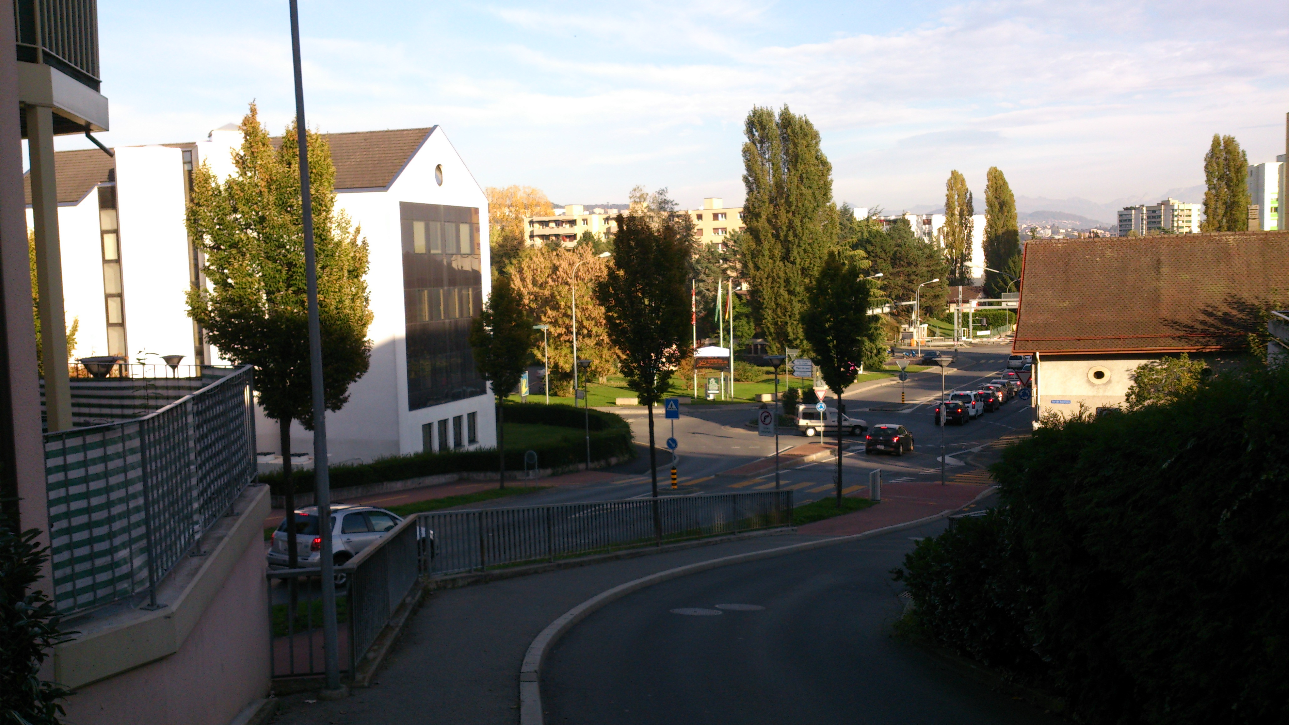 Ecublens